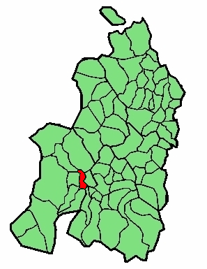 aipaturiko udalerriaren kokapena Nafarroa Beherean